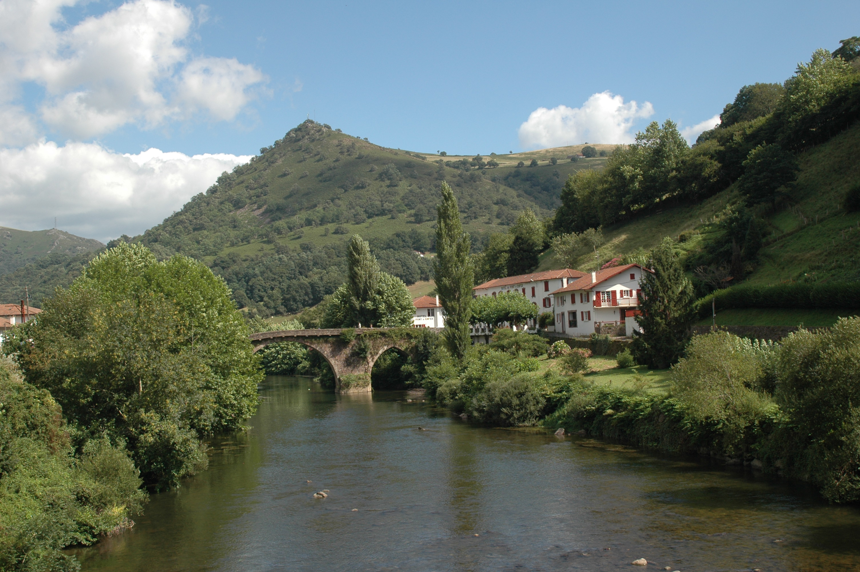 Bidarray, le pont Noblia sur la Nive. Photo prise le 03/08/06 par Harrieta171